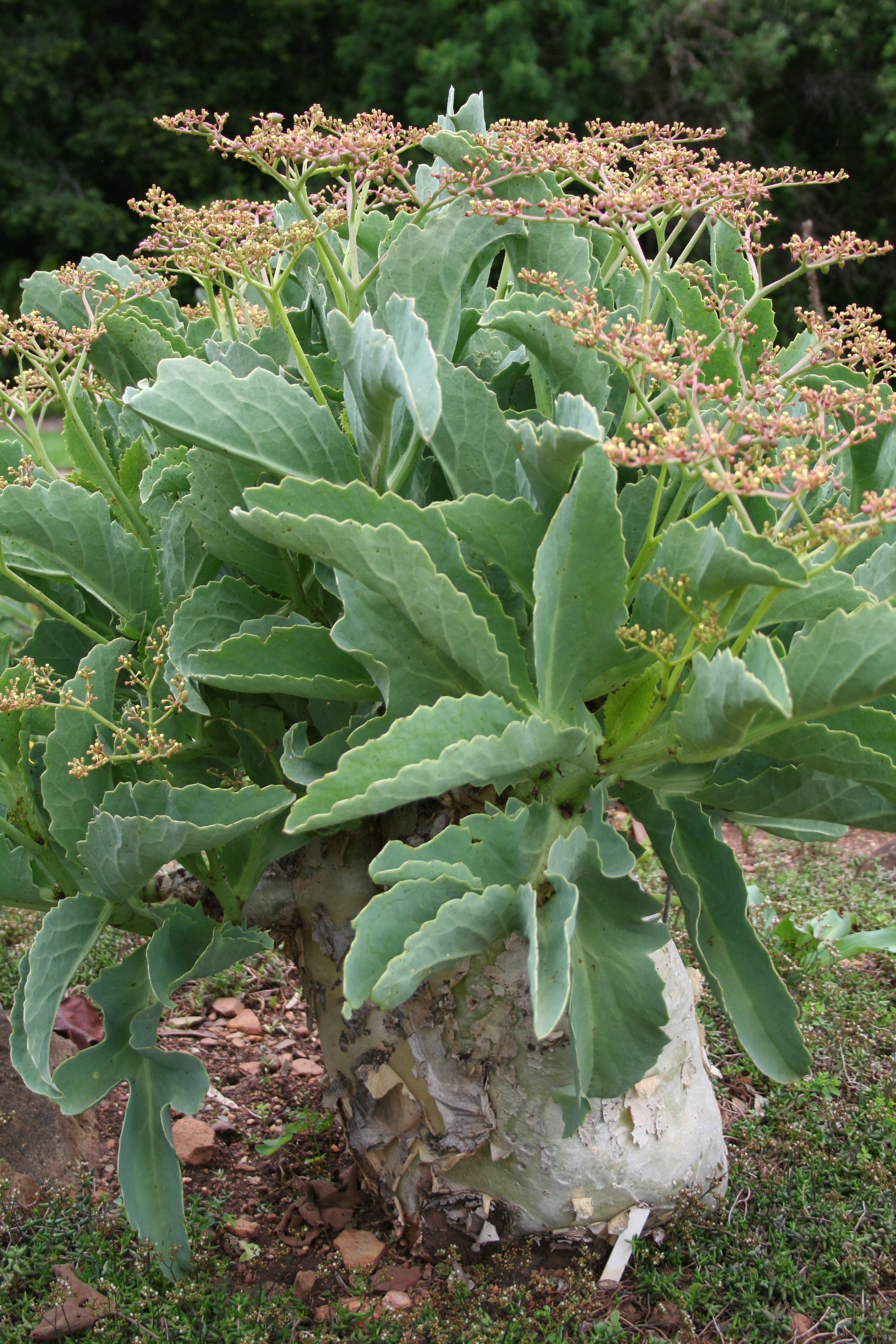 Cyphostemma juttae, W.Sisulu Bot. Garden